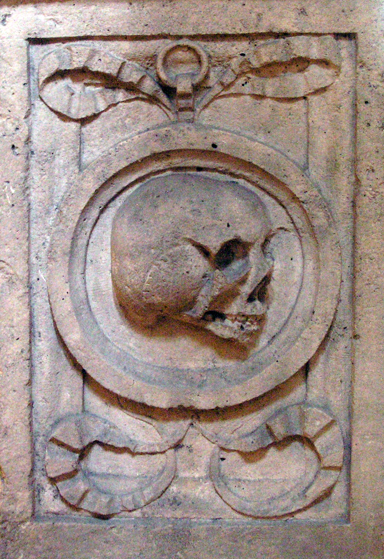 Miroir de la Mort, détail du décor du monument funéraire de Philippe de Guèldre (1547), duchesse de Lorraine et reine de Sicile, Pont-à-Mousson (Meurthe-et-Moselle). Le monument, originellement situé dans le cimetière du couvent des Clarisses de Pont-à-Mousson, est composé d'un socle carré surmonté d'un fût à quatre faces orné d'éléments macabres, le Miroir de la Mort et un squelette. Un cartouche porte l'inscription Jésus Maria Joseph. Le crucifix qui le surmonte date pour sa part du XVIIIe s. The Mirror of Death, detail of the funerary monument of Philippe de Guèldre, duchess of Lorraine and queen of Sicily (1547). Photograph taken by Marsyas 14:31, 26 February 2006 (UTC)